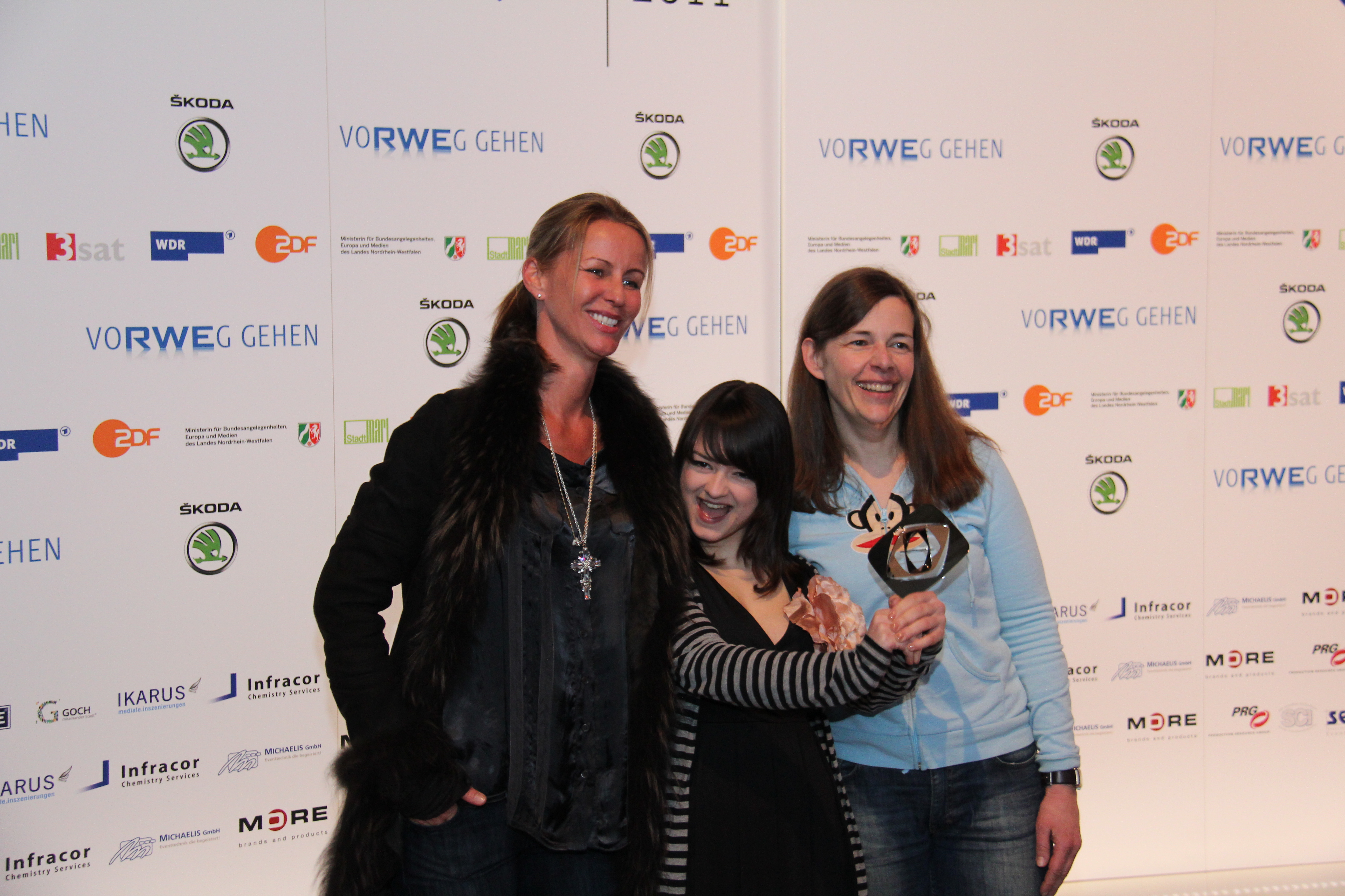 Grimme-Preisträgerinnen Aelrun Goette, Michelle Barthel und Martina Mouchot (Keine Angst) bei der Verleihung 2011